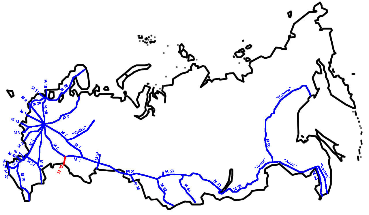 M32 im russischen Fernstraßennetz